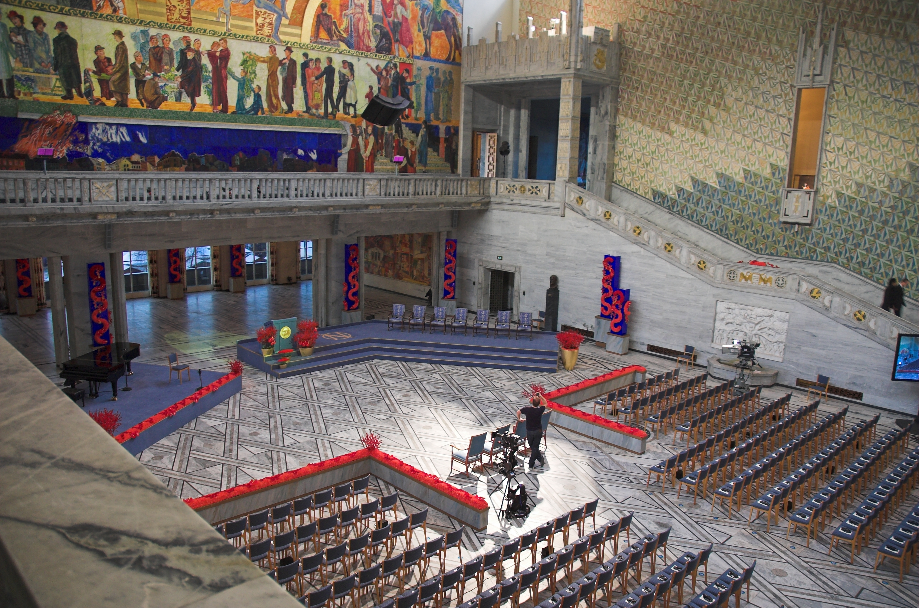 Oslo Rådhus klar for Nobels Fredsprisutdelingen 2008